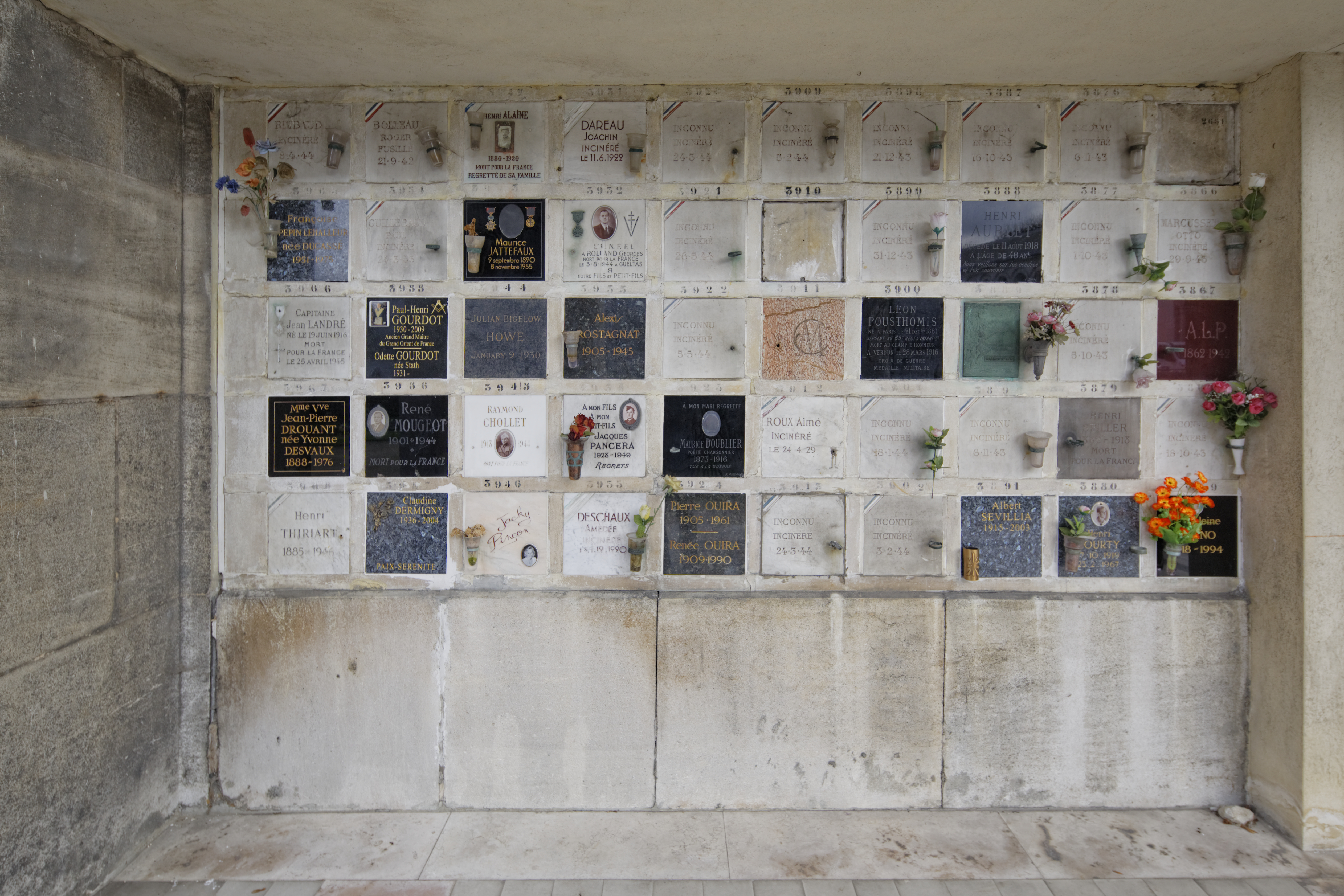 Cases du columbarium du cimetière du Père-Lachaise.